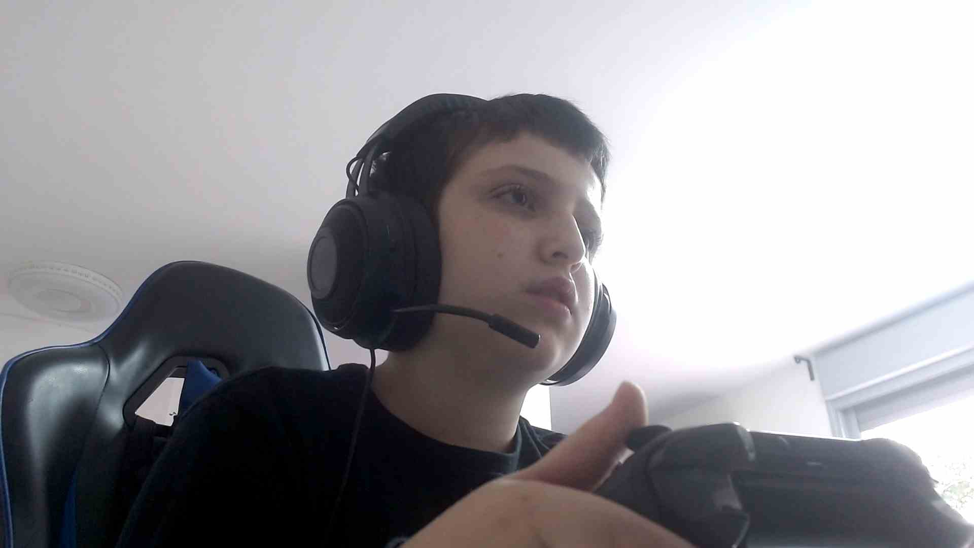 ילד משחק במשחקי מחשב עדכני ל 2020